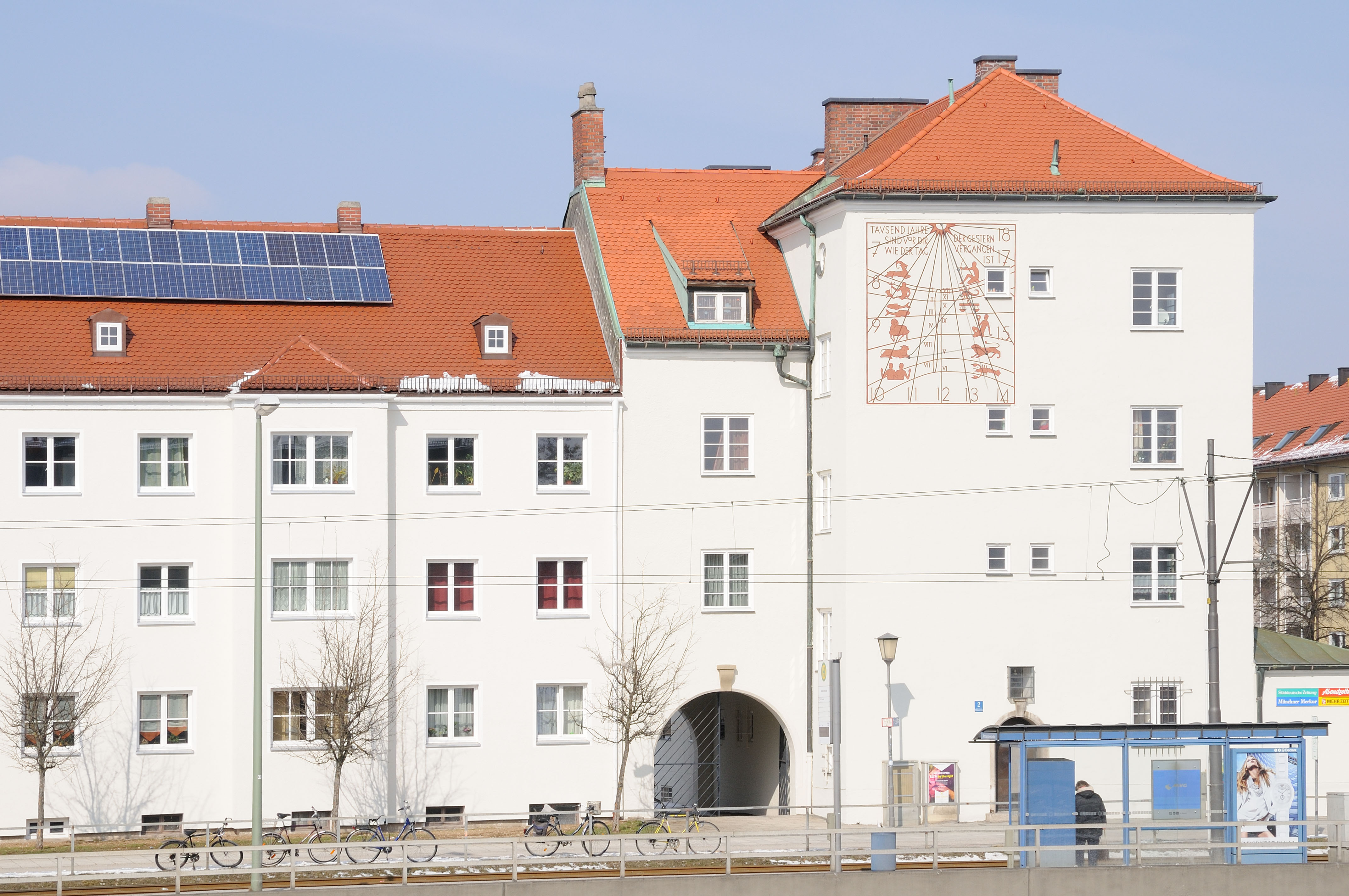 GEWOFAG-Siedlung Friedenheim